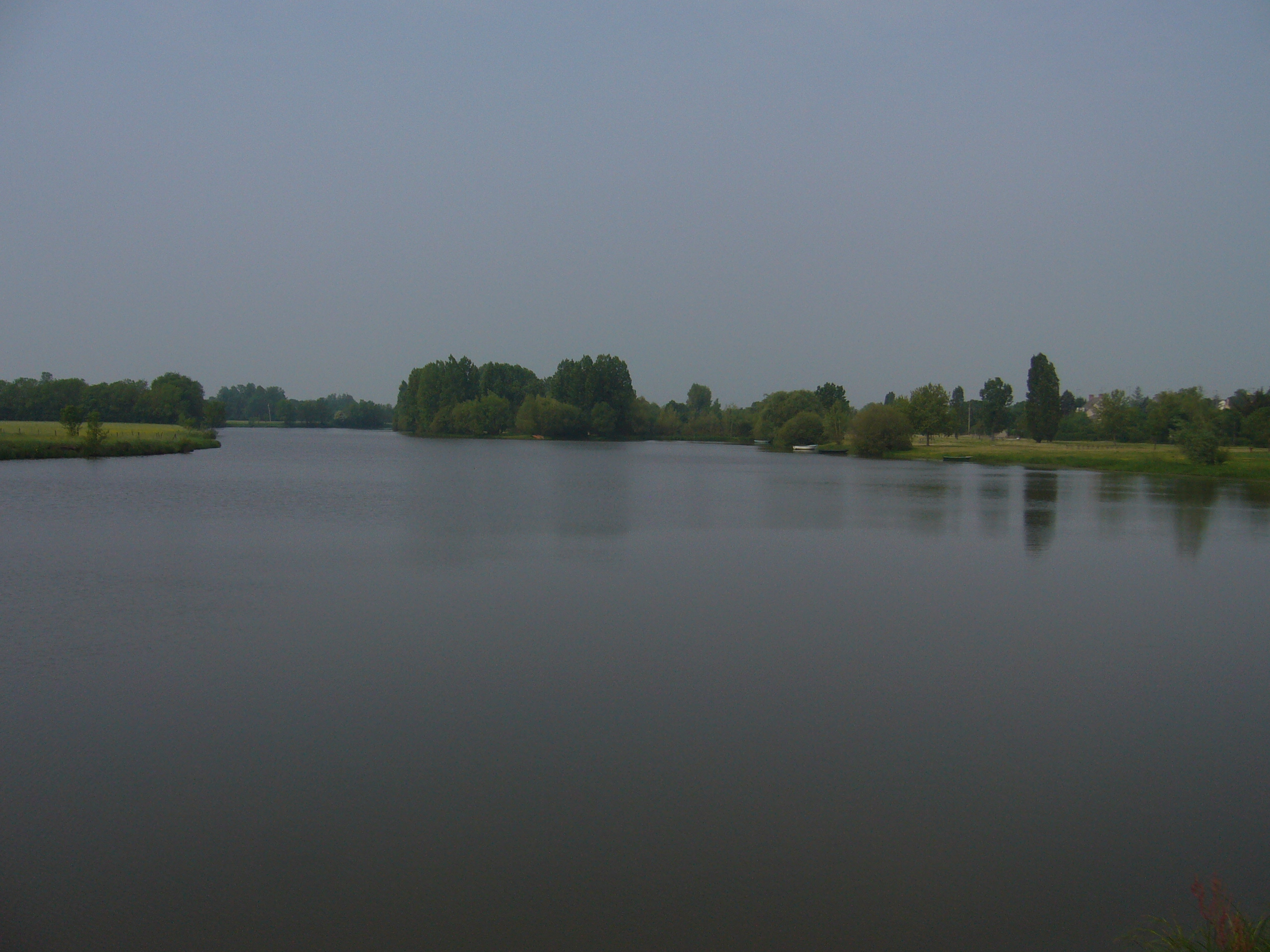 La boire de Champtocé formant l'étang de la Clémencière sur la commune de Champtocé.